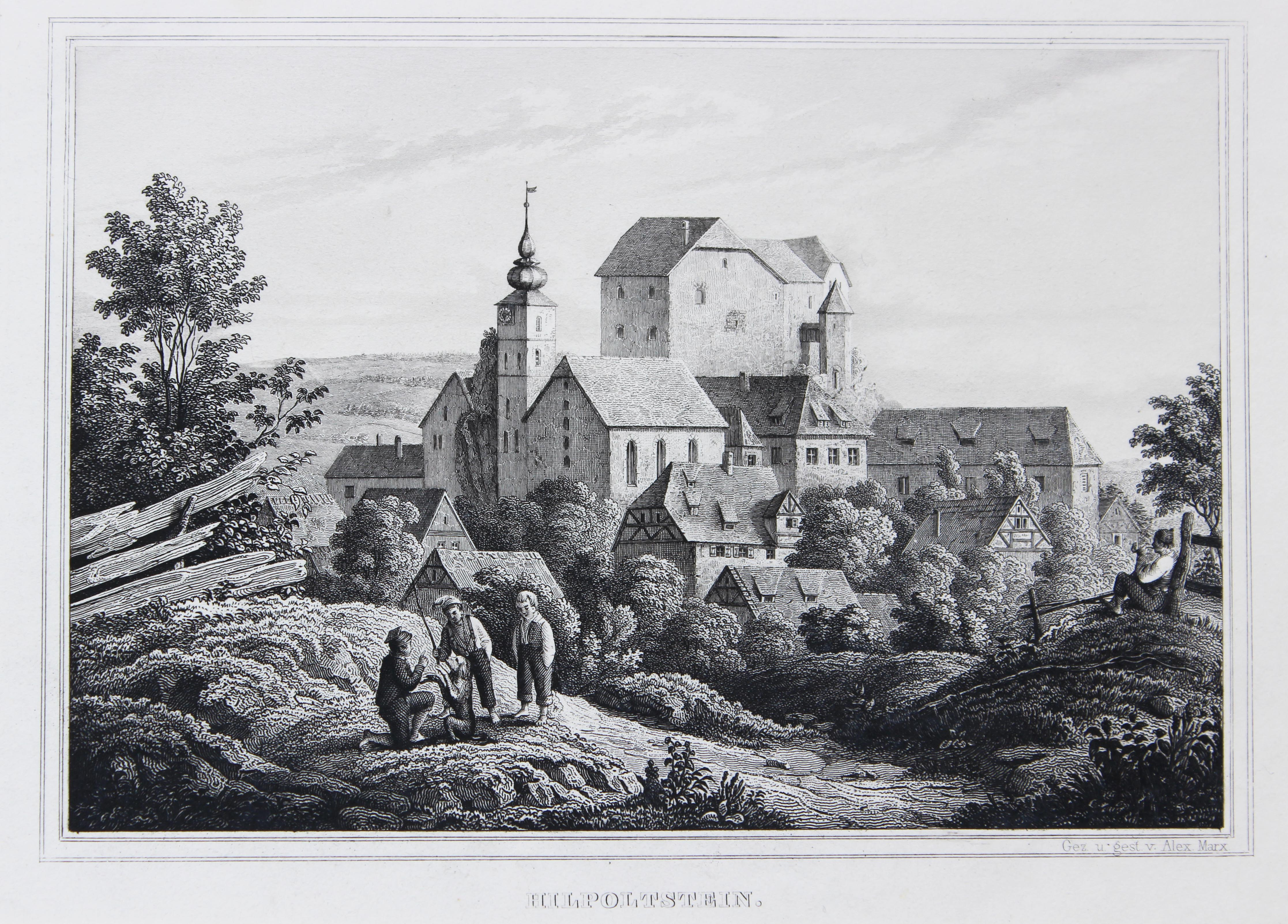 Stahlstich